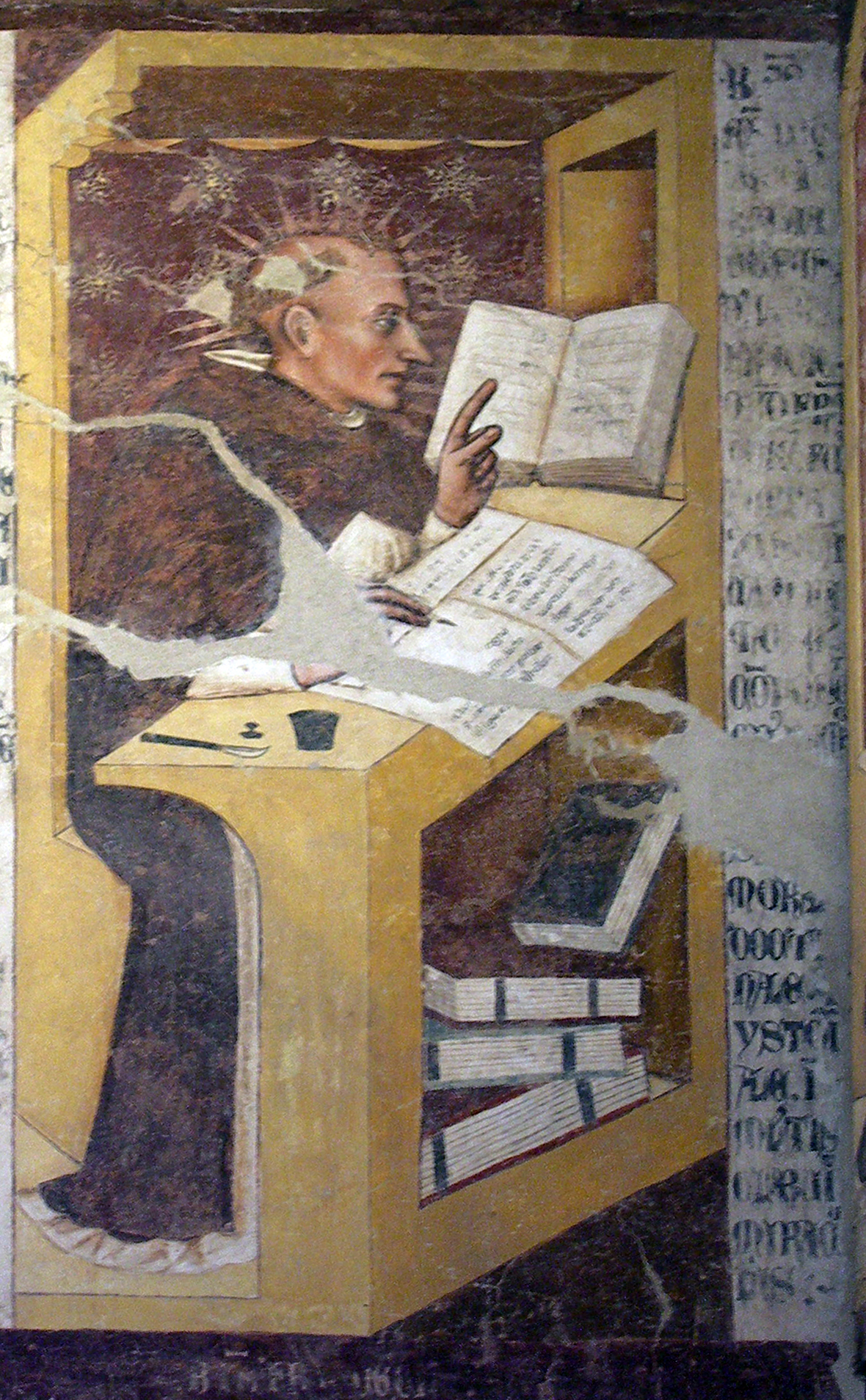 Vincenzo da Beauvais, serie dei Quaranta domenicani illustri, ex convento di San Niccolò, Sala del Capitolo, Treviso, 1352 (altezza di ciascun ritratto 150 cm circa)